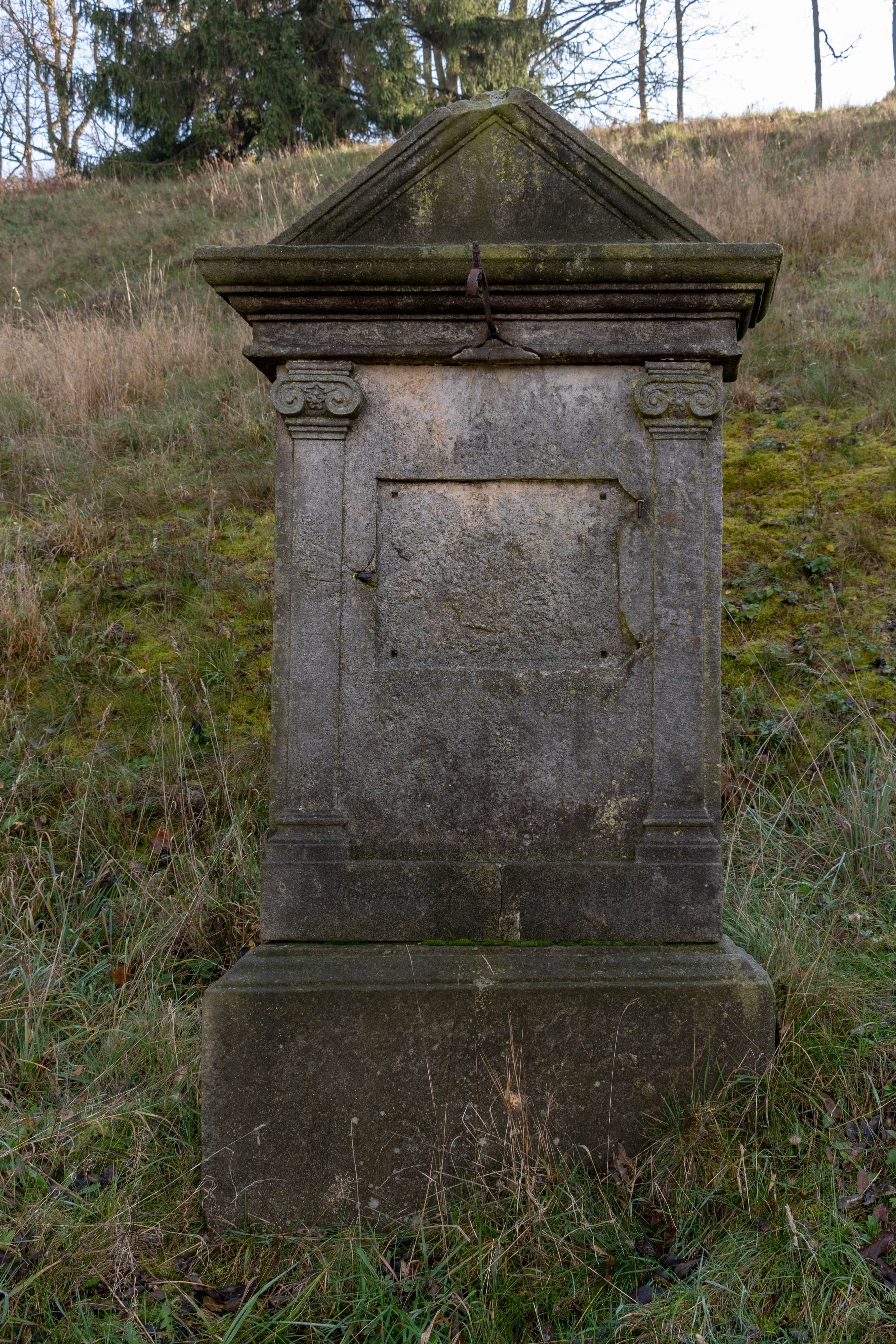 Rozbořená křížová cesta v obci Javor (dříve Horní Dědov)